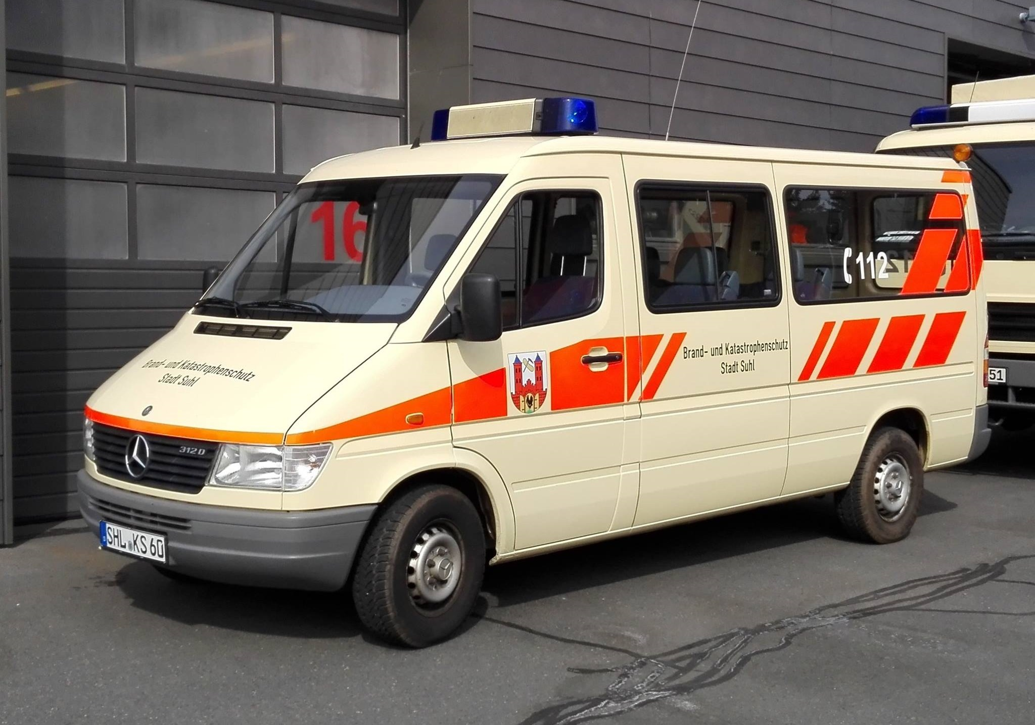 MTW des KatSchutzes der Stadt Suhl